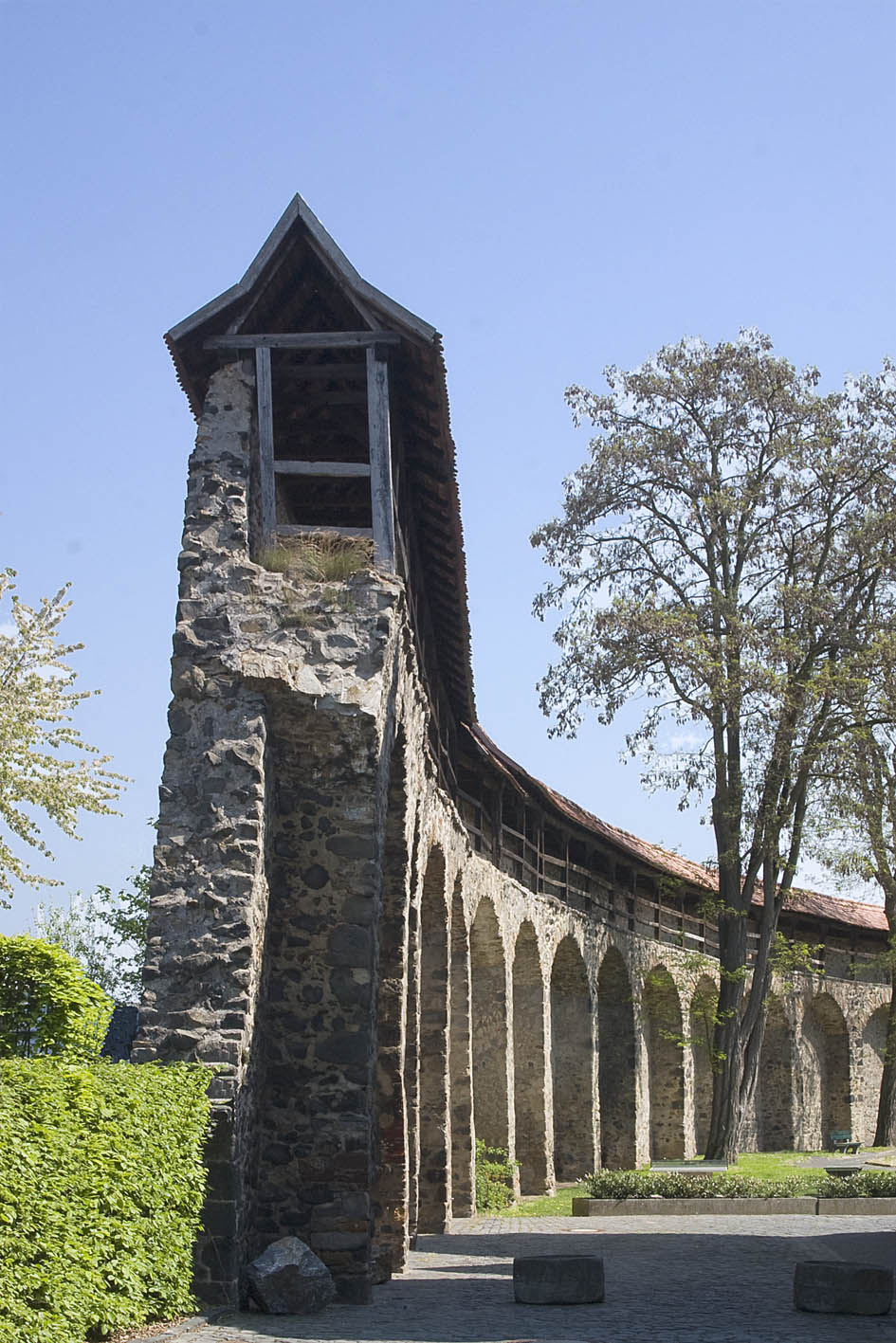 Reste der Stadtmauer mit Schwibbögen Butzbachs in Hessen, Deutschland